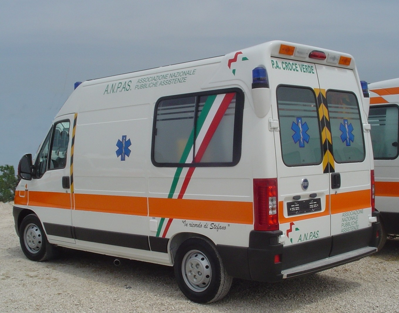 Ambulanza Fiat Ducato con Livrea Associazione Nazionale Pubbliche Assistenze